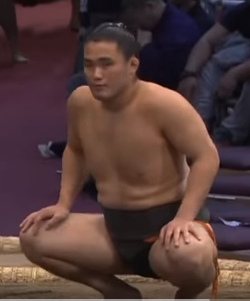 2017年11月場所4日目、土俵上時間前の海士の島